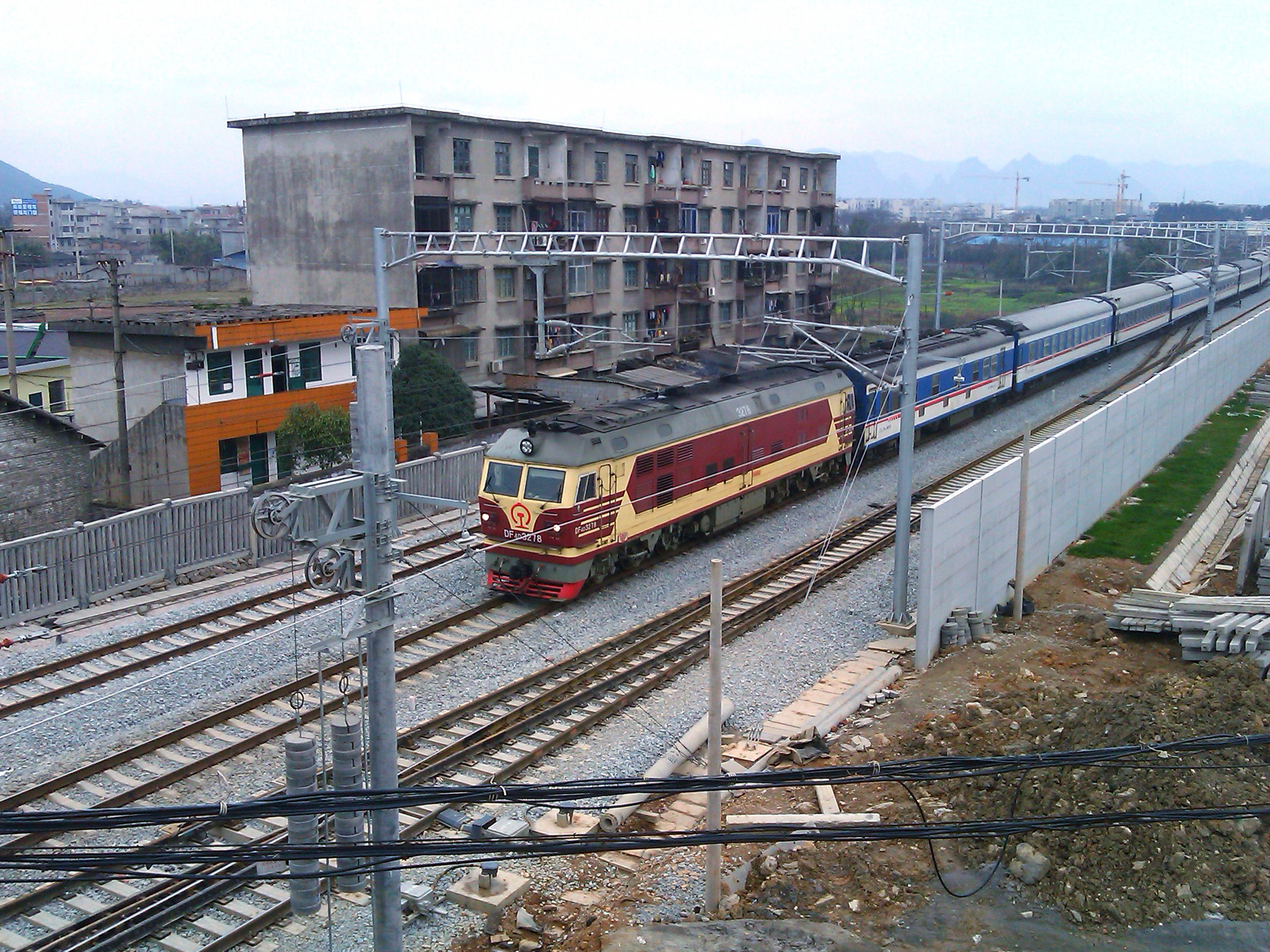 DF4D 3278牵引T77次进入灵川站